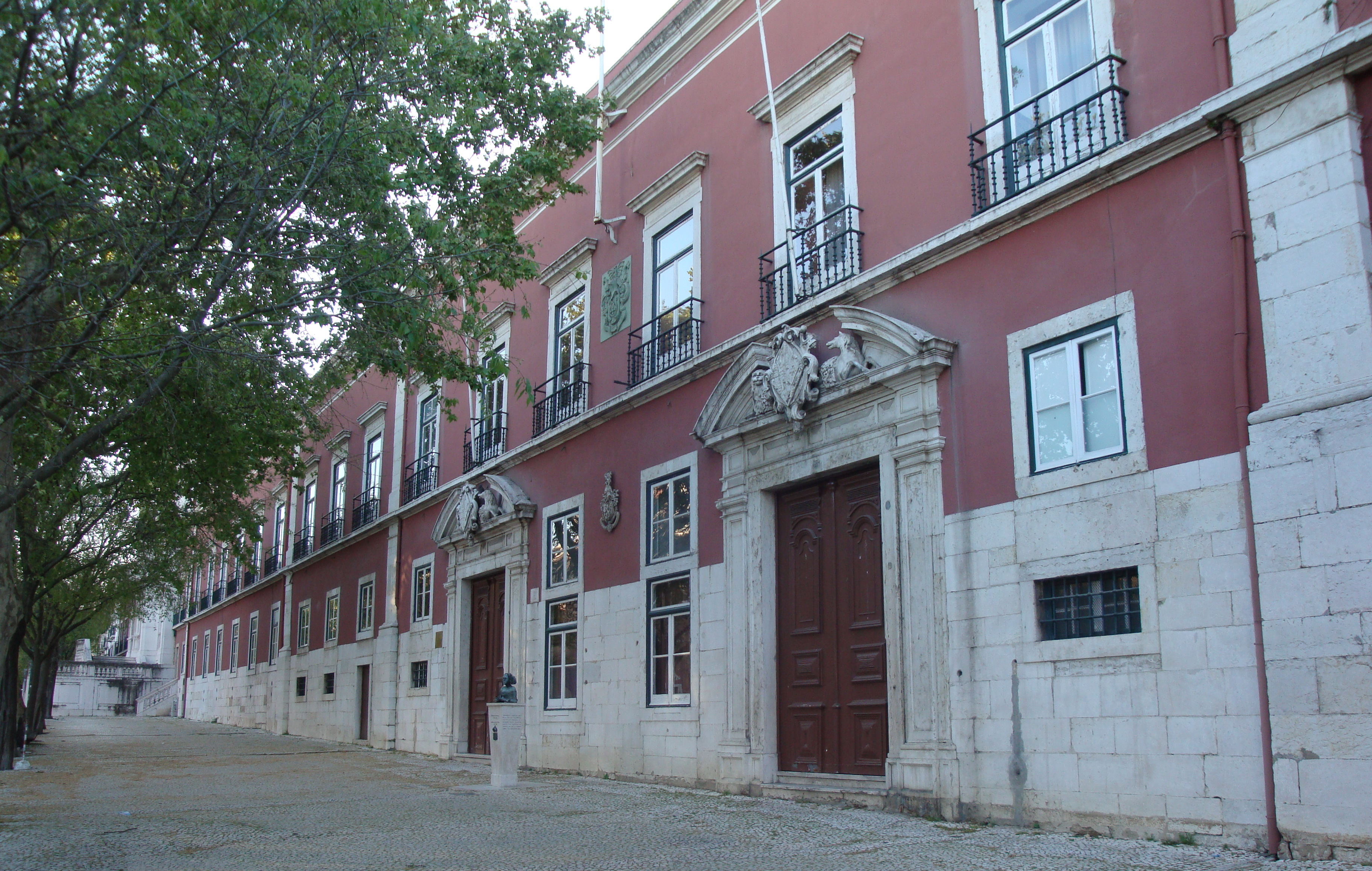 Palácio da Bemposta, em Lisboa.